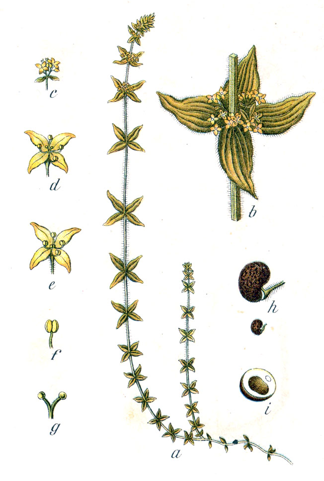 Cruciata laevipes Opiz, syn. Galium cruciata (L.) Scop. Original Caption Kreuz-Labkraut, Galium cruciata